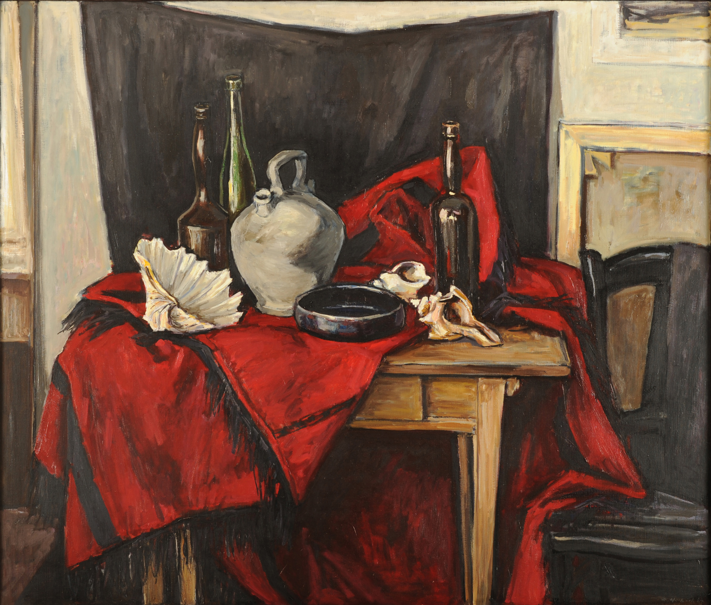 Engelbert Hilbich (1923-2011), Maler. In seinen Stillleben arrangierte er Objekte, die ihn in seinem Alltag begleiteten.